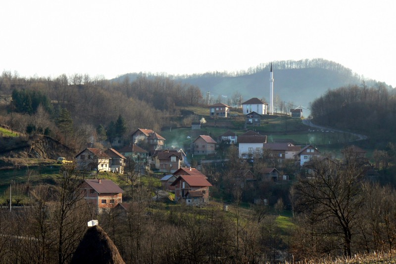 Ajani - centar Gornje Ozimice